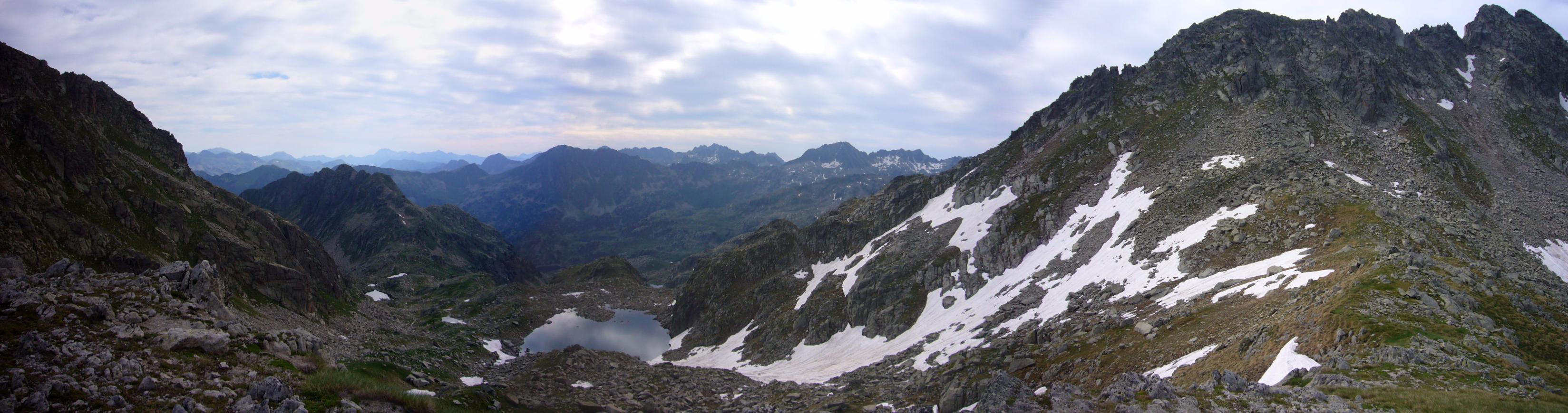 Circ de Colomèrs vist des del Port de Caldes; la Vall de Boí, Alta Ribagorça, Catalunya